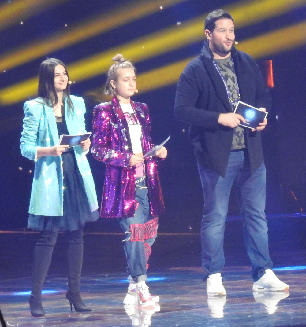 Helena Meraai, Zinaida Kupriyanovich i Evgeny Perlin, prowadzący 16. Konkurs Piosenki Eurowizji dla Dzieci w Mińsku, 24 listopada 2018.